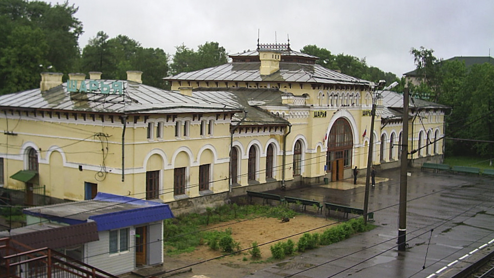 Bahnhof Scharja. Scharja Шарья.